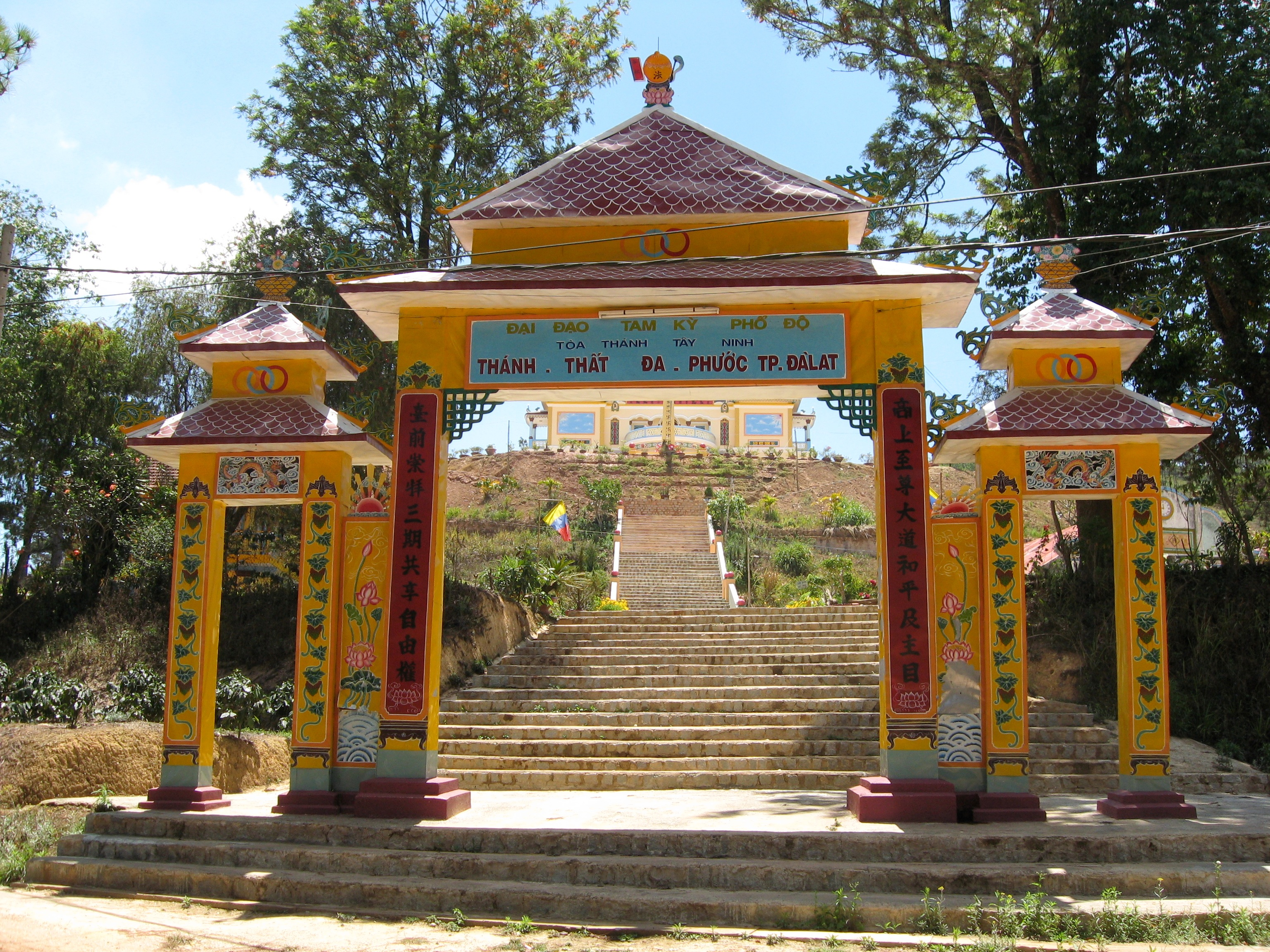 Thanh that Da Phuoc